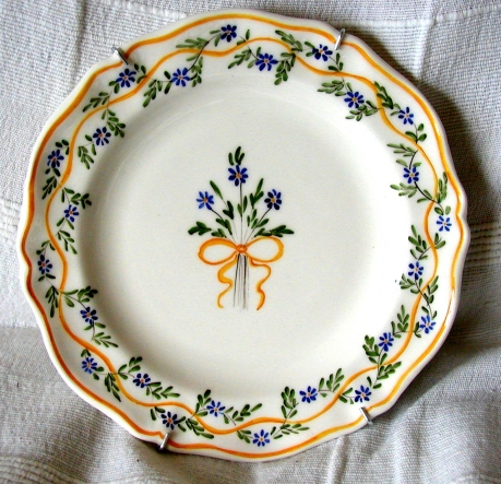 Assiette en faïence de Varages - motif XVIII ème siècle